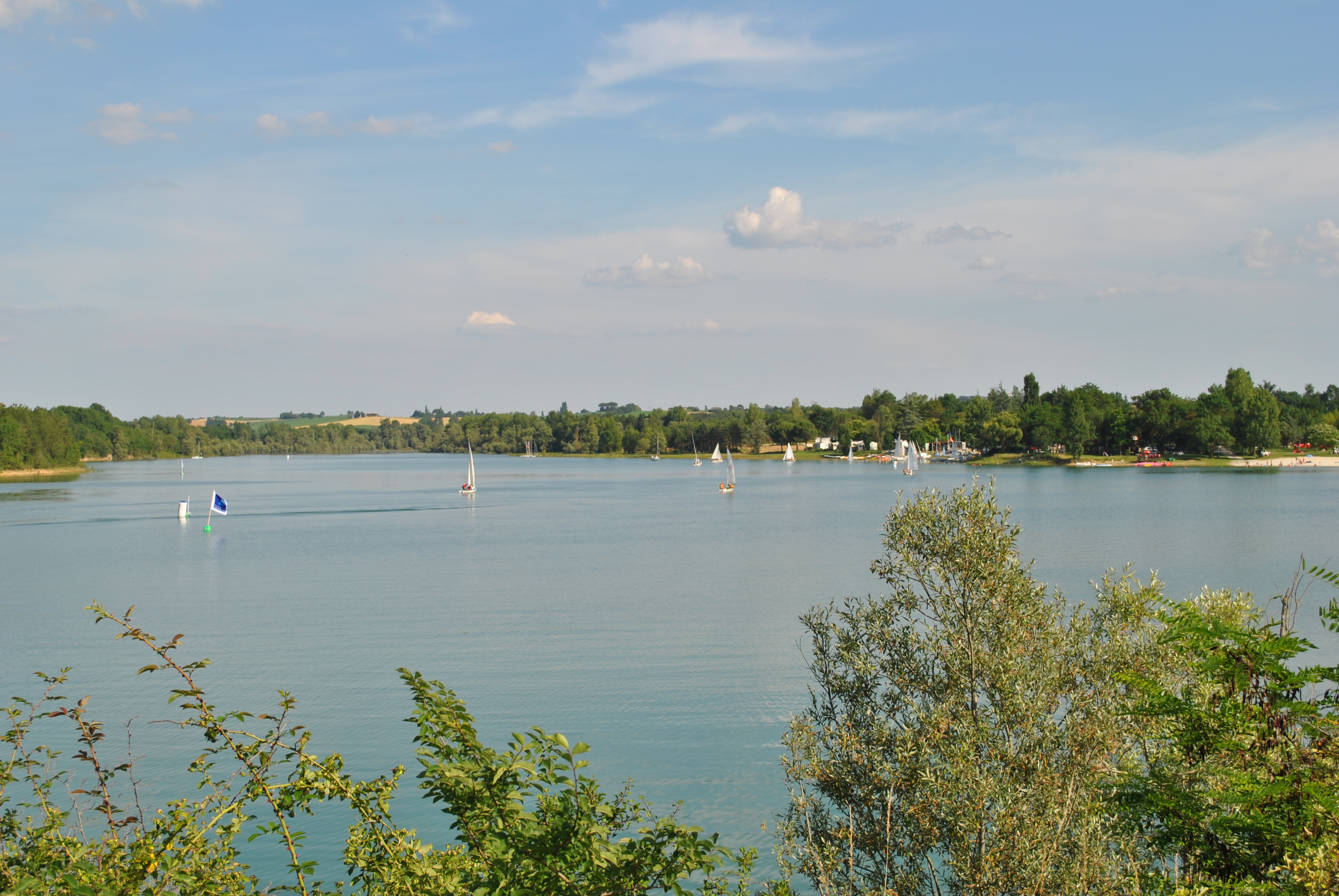 Voiliers et Plage du Lac de Thoux St-cricq